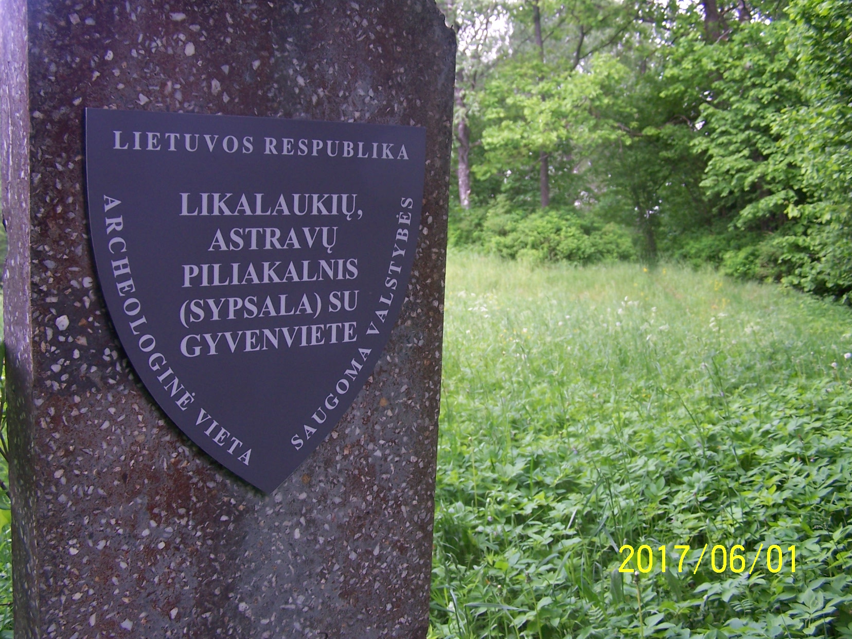 Likalaukių piliakalnis